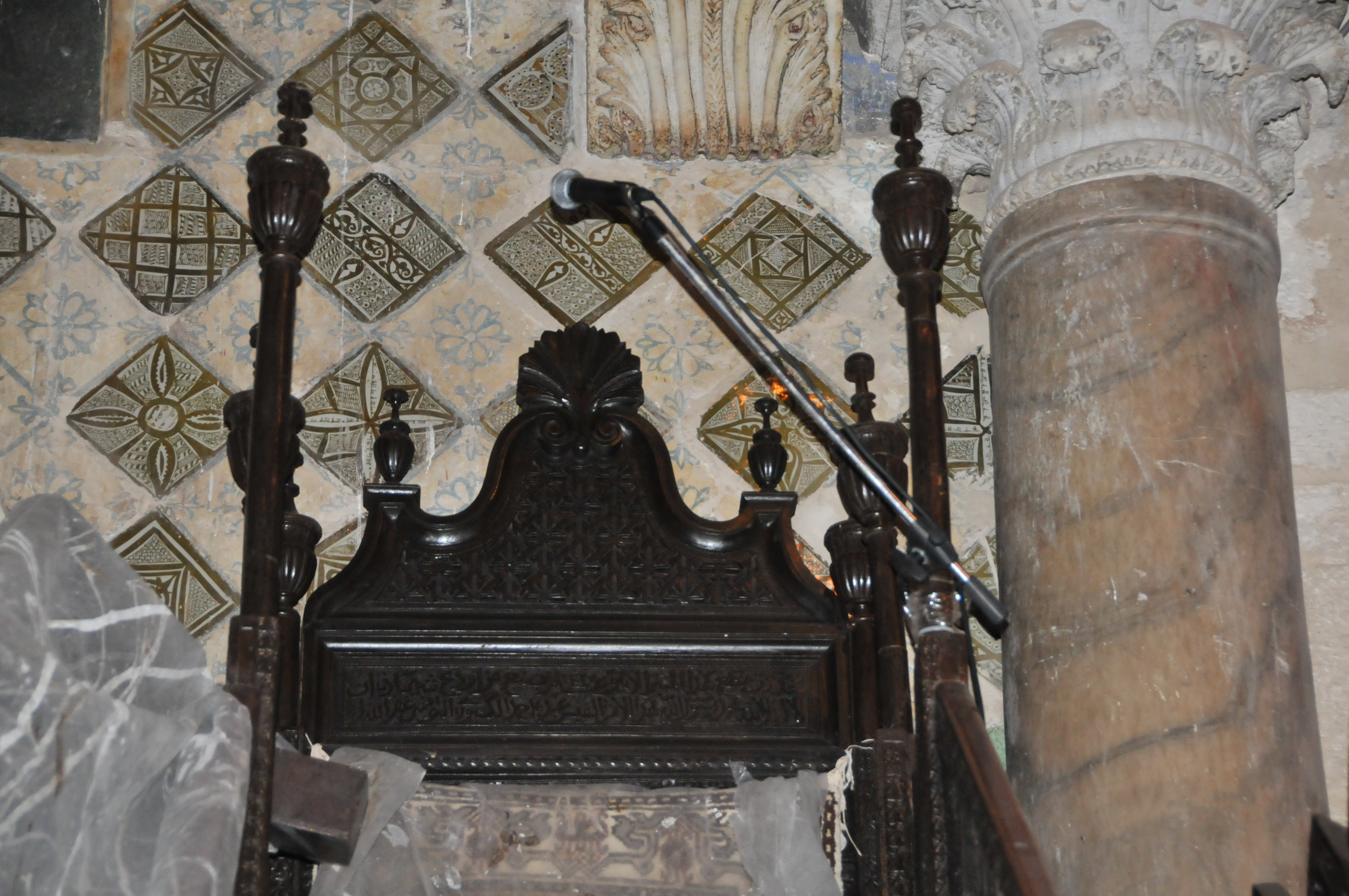 Minbar de la grande mosquée de Kairouan